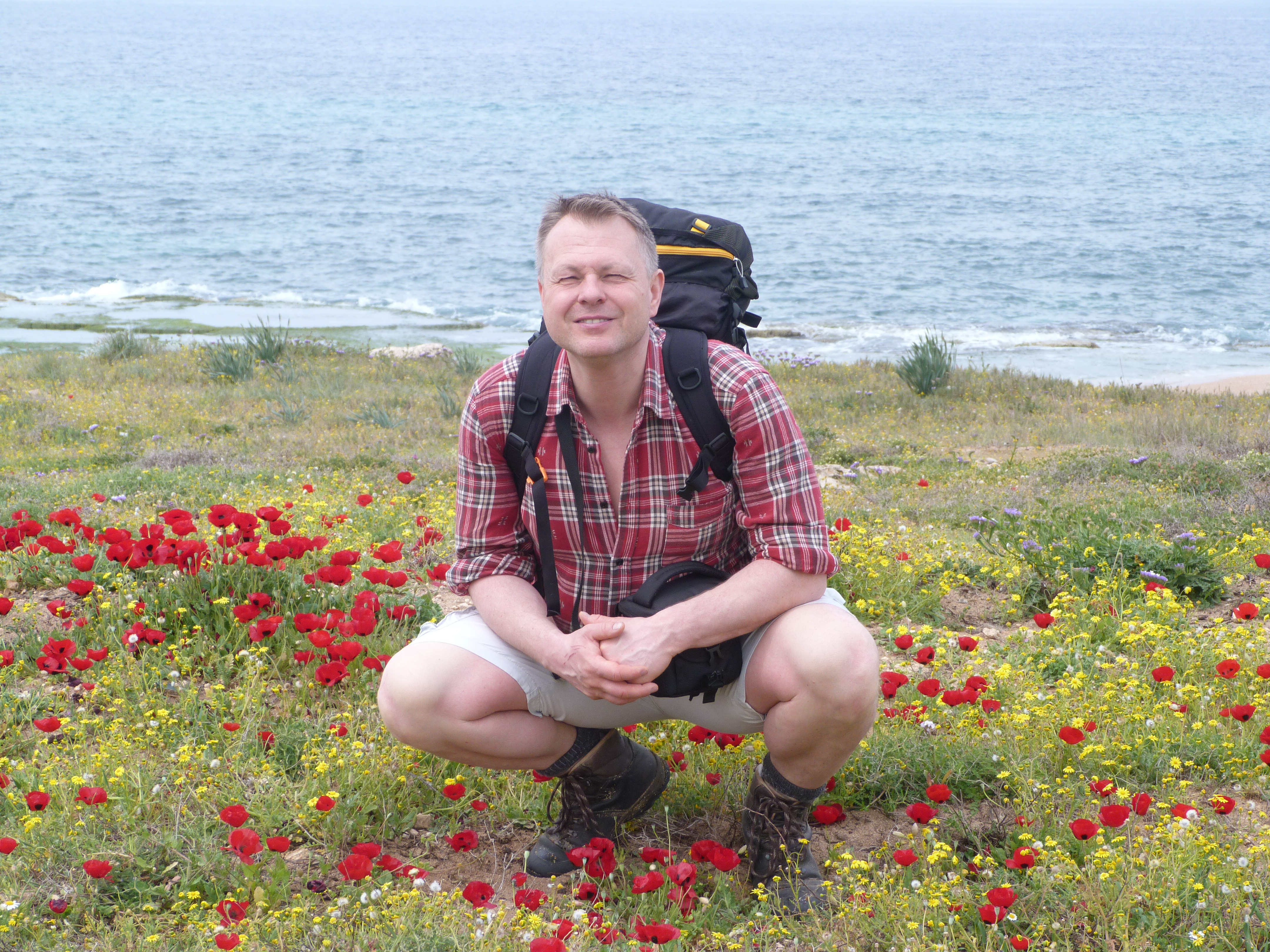 Autor Marek Řeháček na ostrově Rujána.